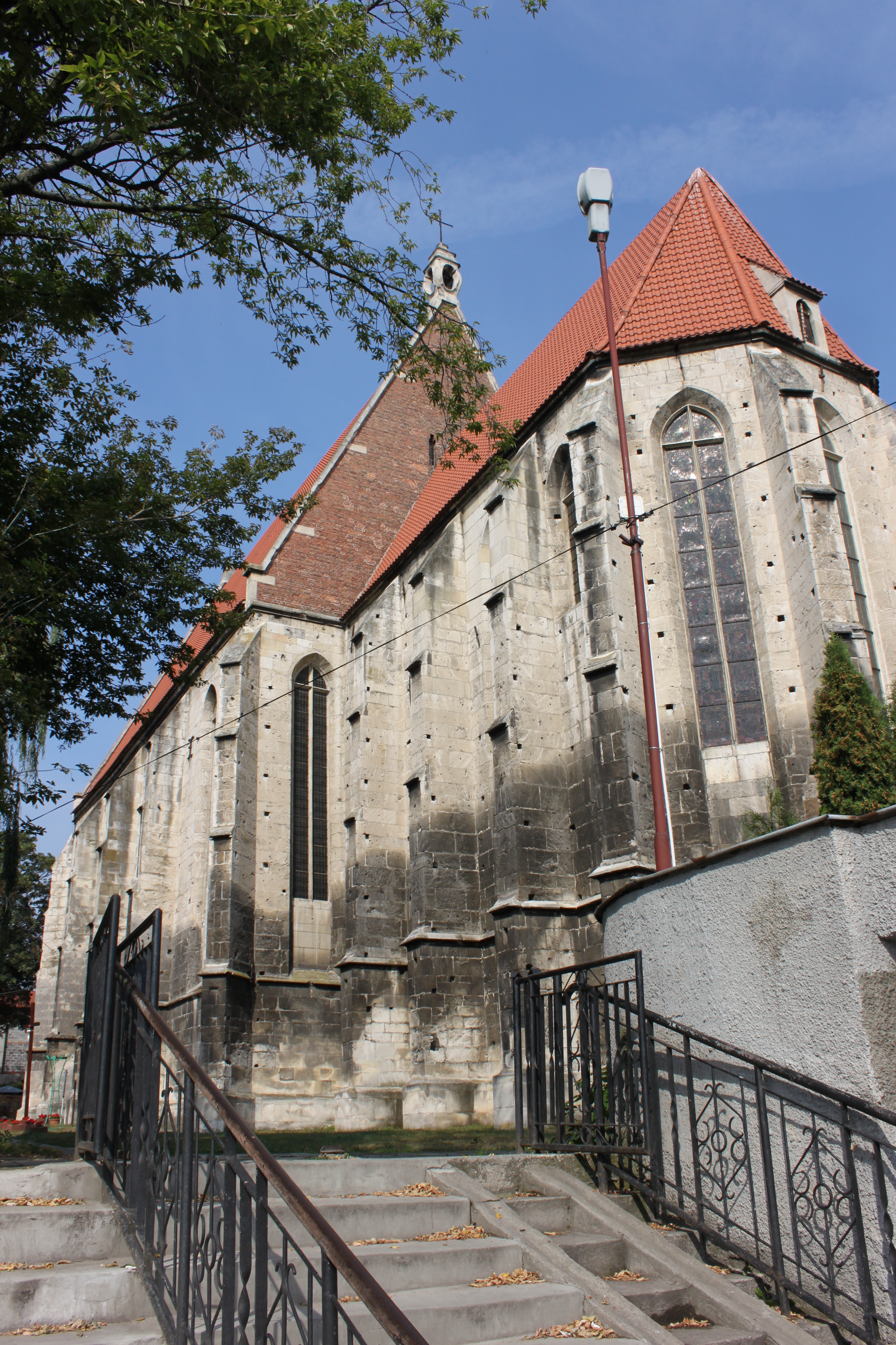 XV edycja Małopolskich Dni Dziedzictwa Kulturowego. Bazylika Kolegiacka Narodzenia NMP oraz Muzeum Regionalne w Wiślicy 18-19 maja. fot. J. Nowostawska-Gyalókay, MIK 2012